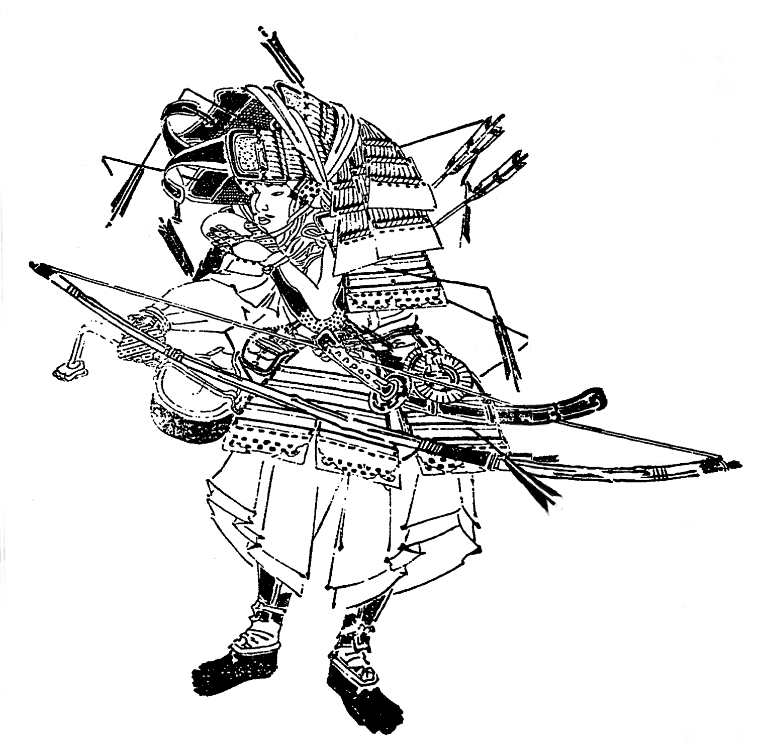 金子家忠。平安時代末期 - 鎌倉時代初期の武将。／江戸時代『前賢故実』より。画：菊池容斎